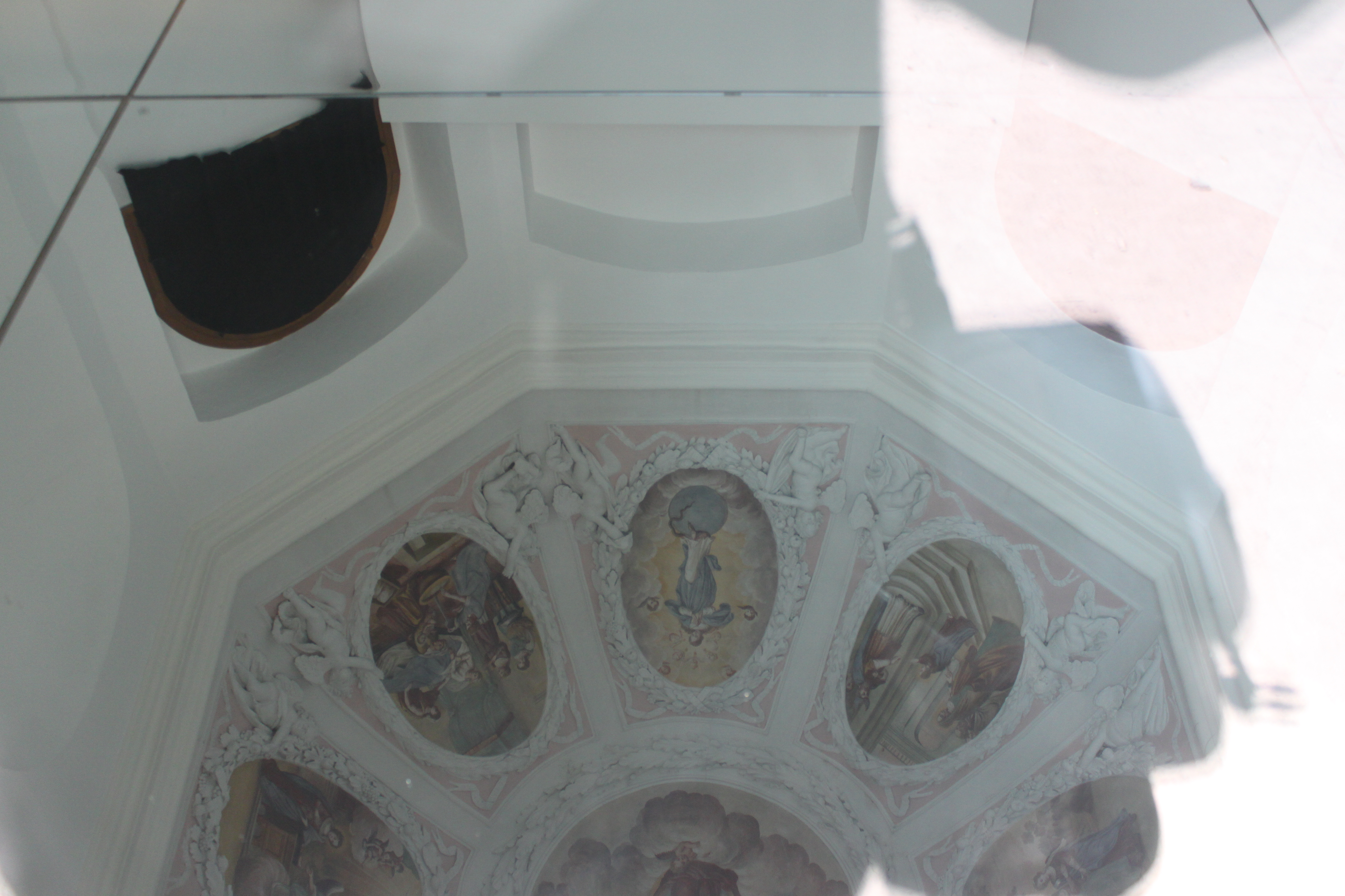 Klostergebäude der Ursulinen/Kulturzentrum mit Kapelle, Deckenfresko im Spiegelbild des Bodens